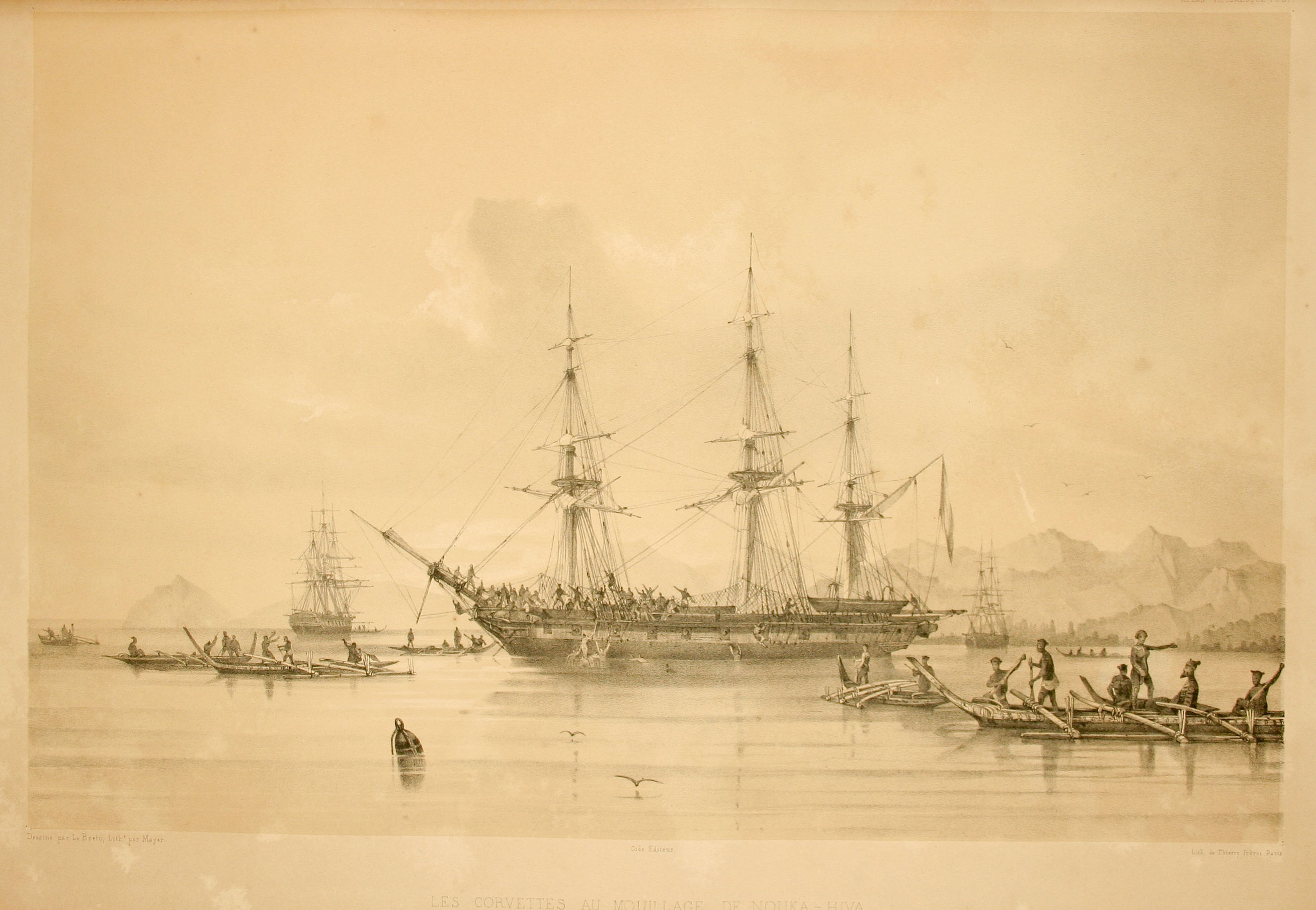 Les corvettes au mouillage de la baie Anna-Maria. Atlas pittoresque, planche 51